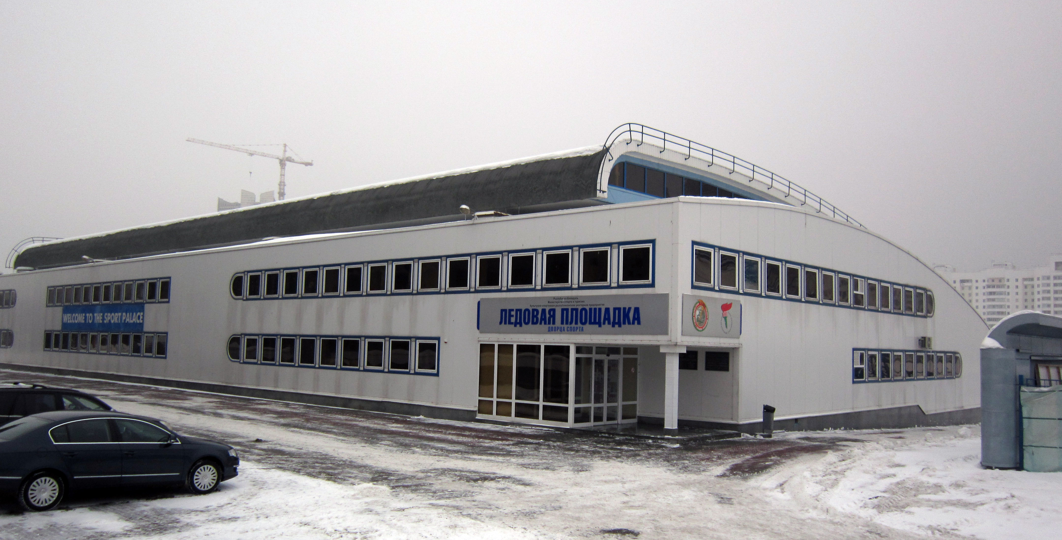 Минск. Ледовая арена Дворца спорта